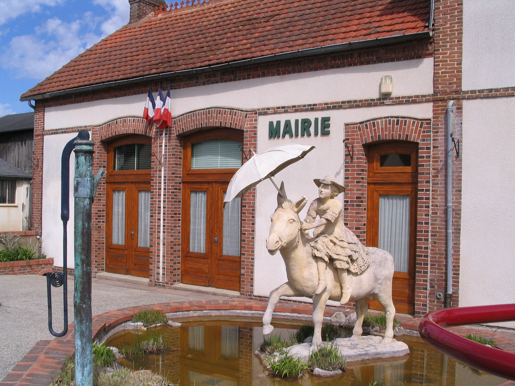 Mairie de la comune d'Aube (Orne,France)